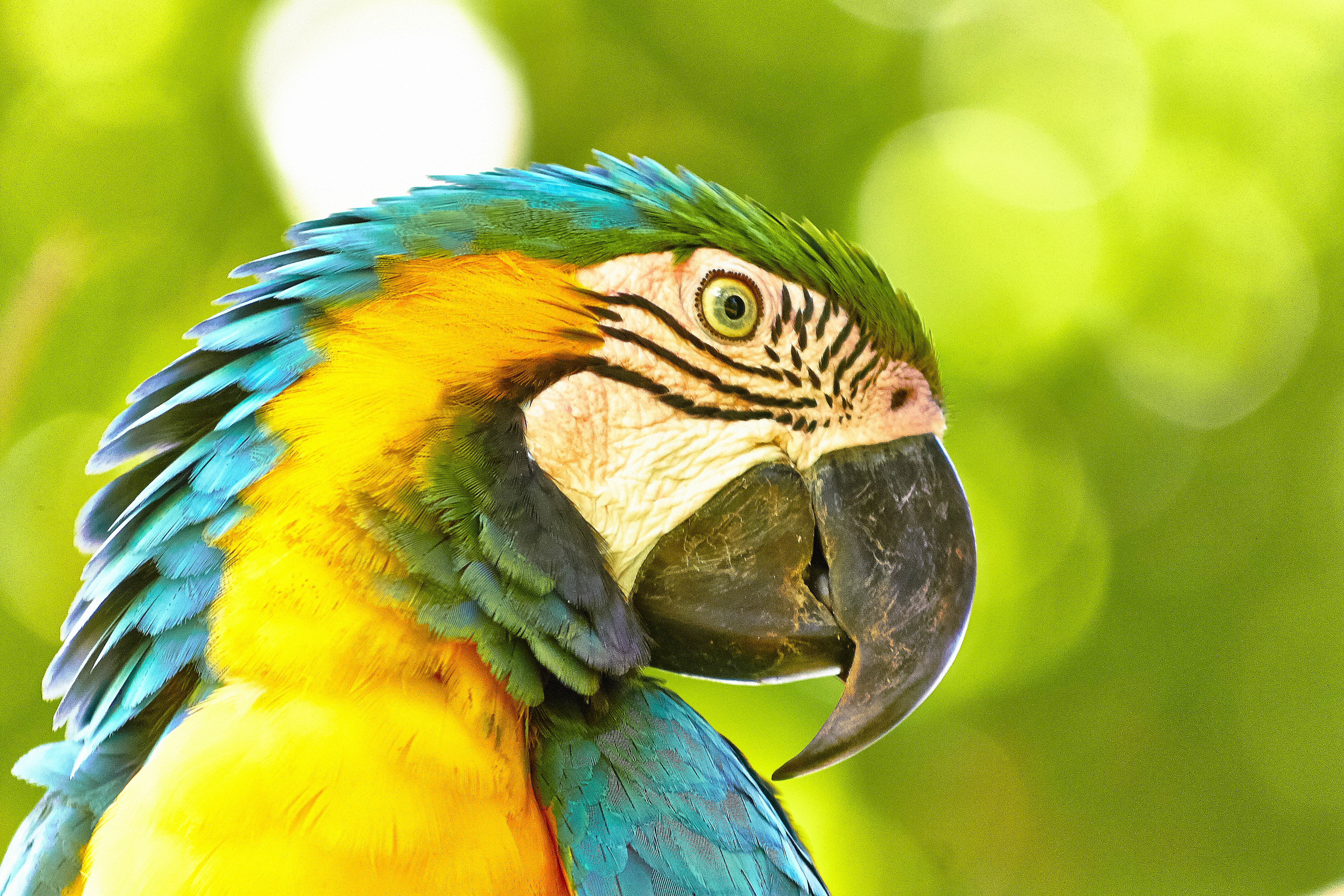 El guacamayo azulamarillo (Ara ararauna),2 también conocido como guacamayo azul y amarillo, papagayo amarillo o paraba azul amarillo,3 es una especie de ave psittaciforme de la familia de los loros endémica de América del Sur. Su área de distribución comprende desde Panamá hasta el norte de Paraguay y Bolivia,1 pasando por toda la cuenca amazónica. En cautividad se reproducen fácilmente; en libertad viven en grupos de 25-30 ejemplares. Este loro es el representante inconfundible de los guacamayos, loros con poderosos picos y colas muy largas.